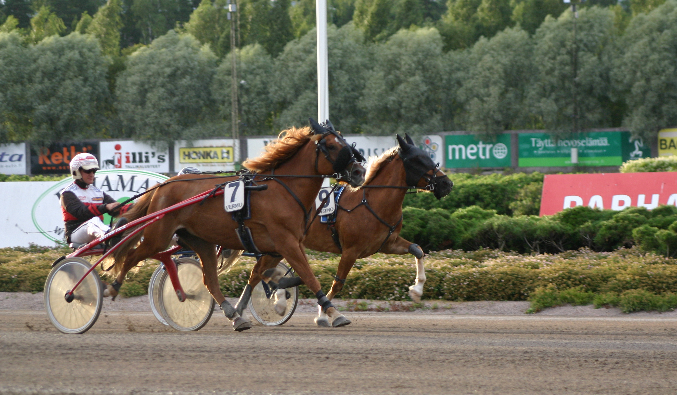 Turolii 1909-00J driven by Akseli Lahtinen.